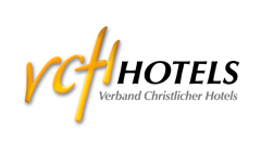 Logo-vch_m.jpg